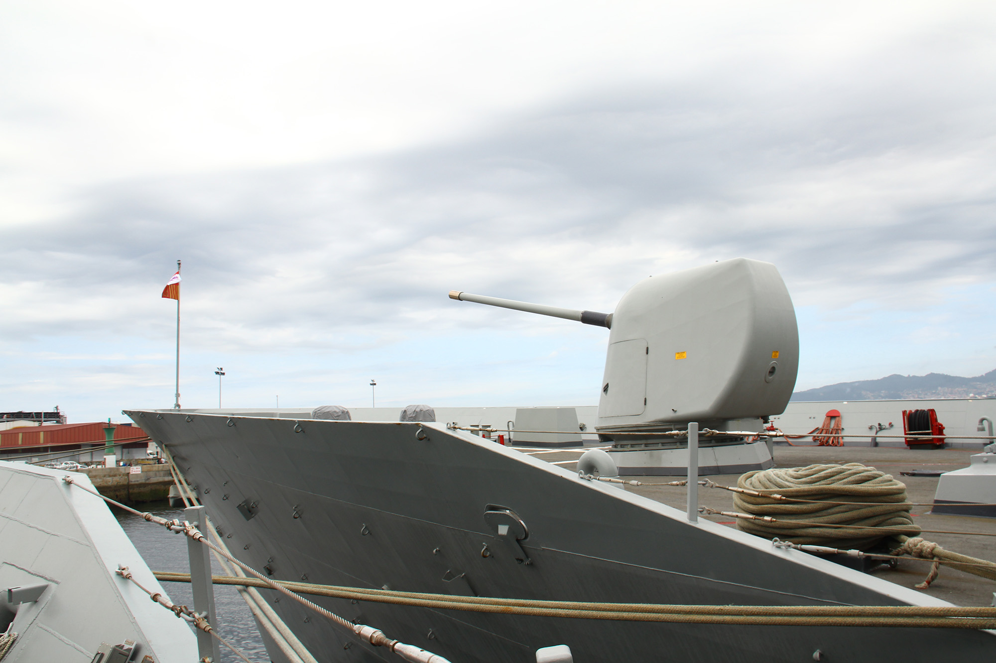 Visita a Vigo de las fragatas "Álvaro de Bazán" F-101 y "Almirante Juan de Borbón" F-102 de la Armada Española, ambas de la clase "Álvaro de Bazán" (también conocida como F-100), el 27 y 28 de mayo de 2017. Frigates F-100 in Vigo Visit to Vigo of the frigates "Álvaro de Bazán" F-101 and "Admirante Juan de Borbón" F-102 of the Spanish Navy, both of the class "Álvaro de Bazán" (also known as F-100), May 27 and 28, 2017.